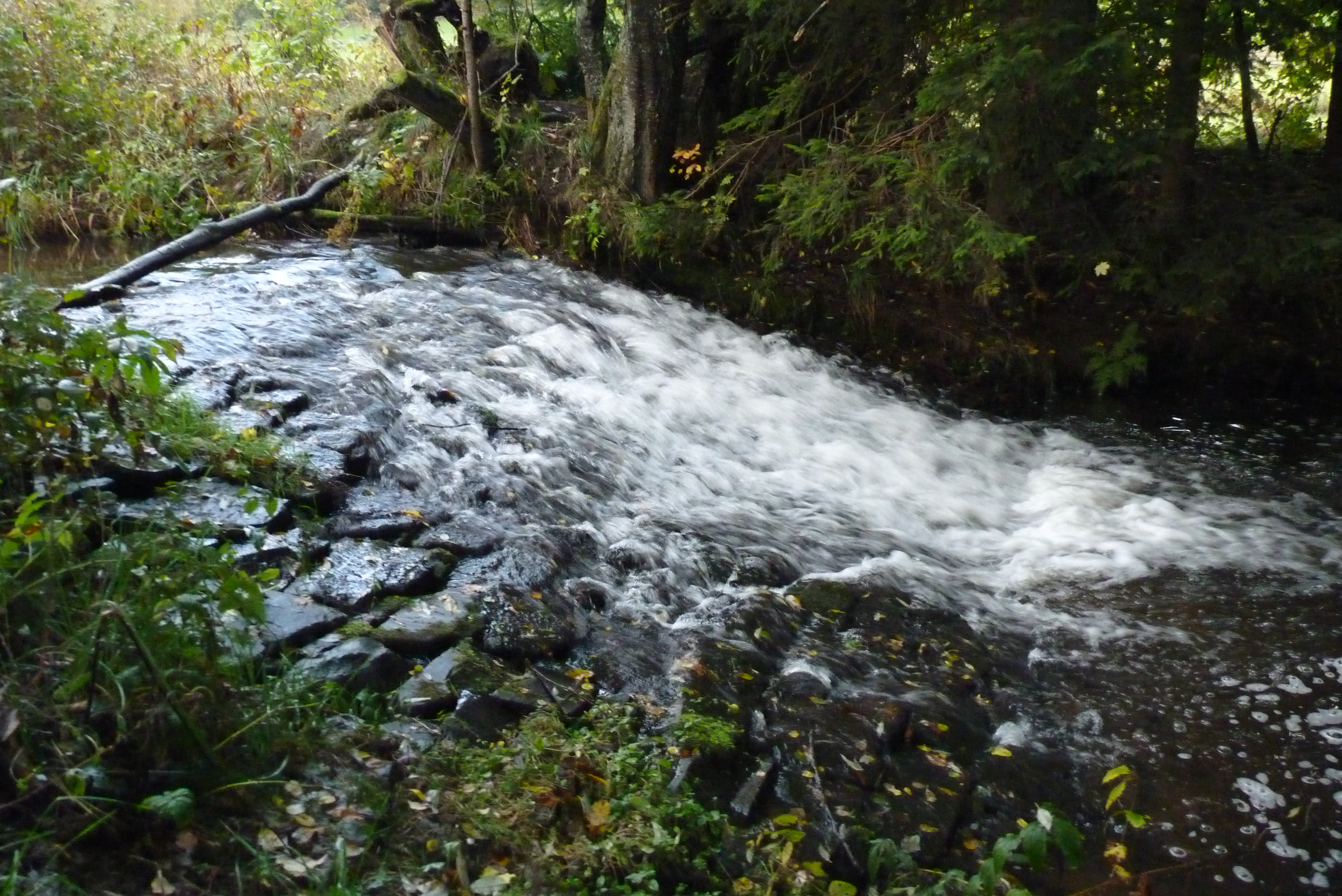 Die Sieg im oberen Siegtal bei Grissenbach an einem kleinen Wasserfall